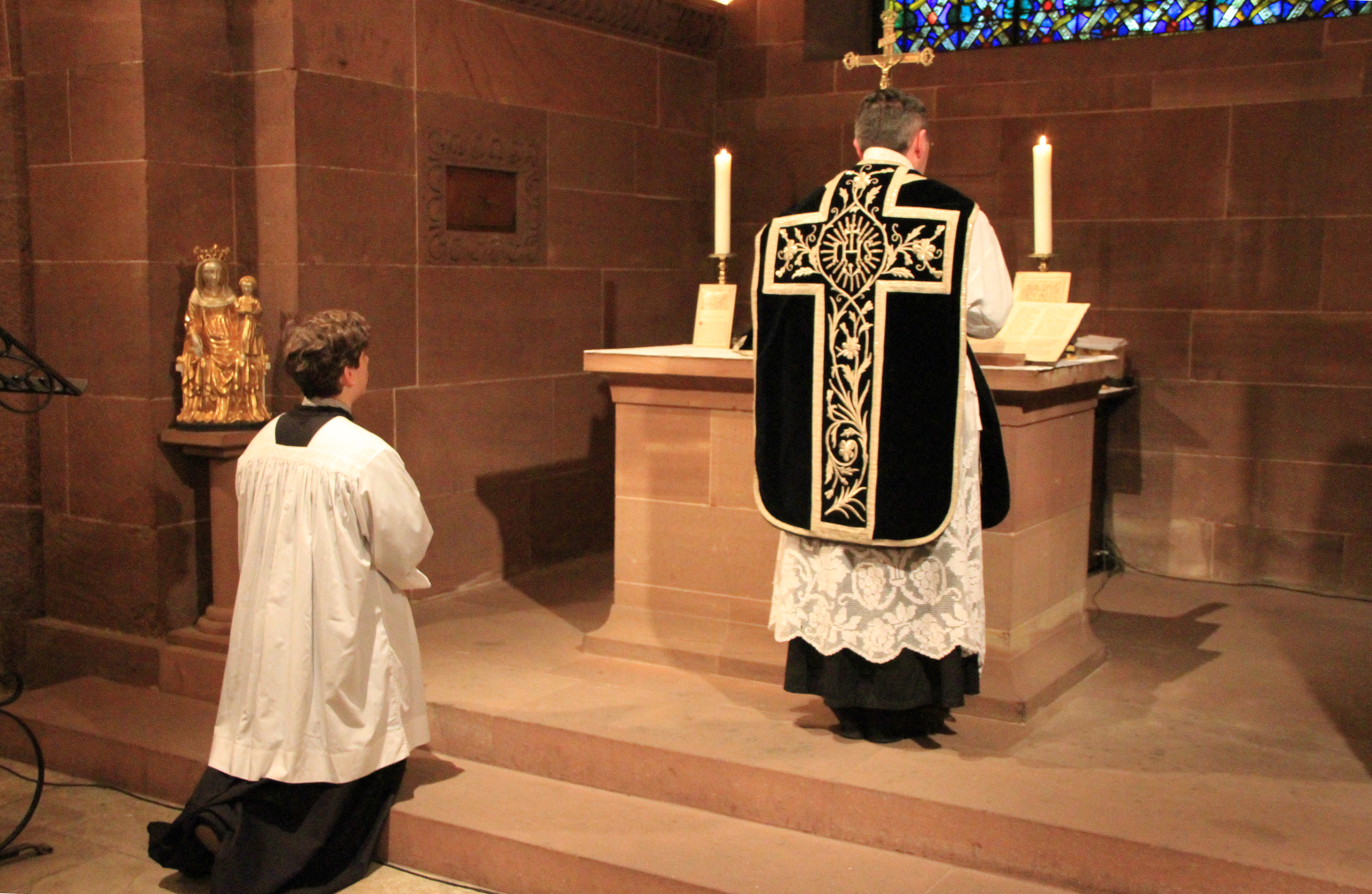 Strasbourg crypte de la cathédrale Notre Dame, messe de Requiem à la mémoire du roy Louis XVI et des martyrs de la Révolution française 19 janvier 2013